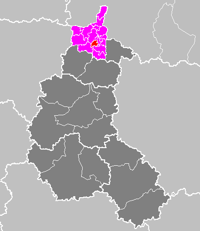 Maps of arrondissements and cantons of France: Arrondissement de Charleville-Mézières - Canton de Mézières-Centre-Ouest.PNG